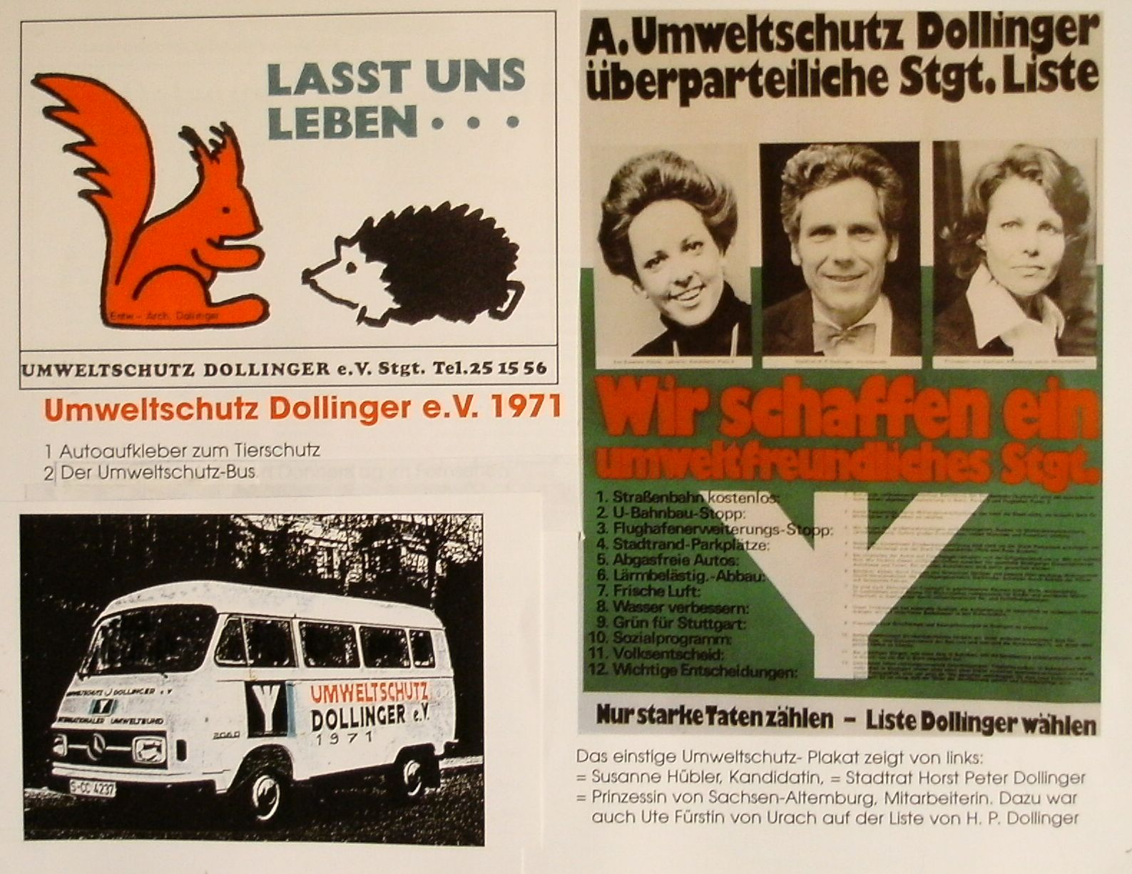 Umweltschutz Dollinger e.V.